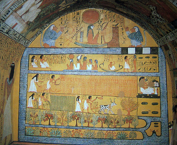 Photographie du caveau de la tombe de Sennedjem - illustration du Champ des Roseaux